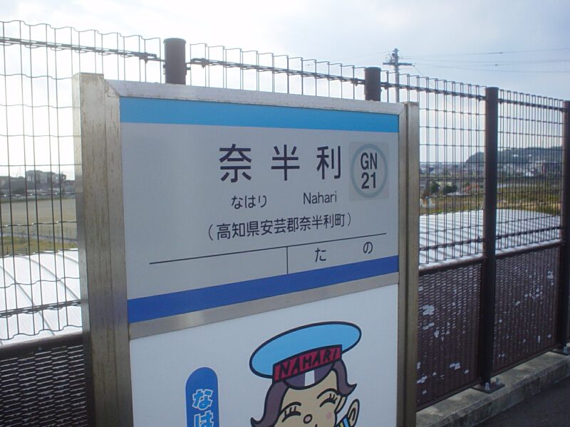 土佐くろしお鉄道 奈半利駅名標